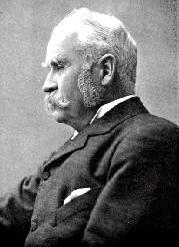 W. S. Gilbert, English librettist (1836-1911)